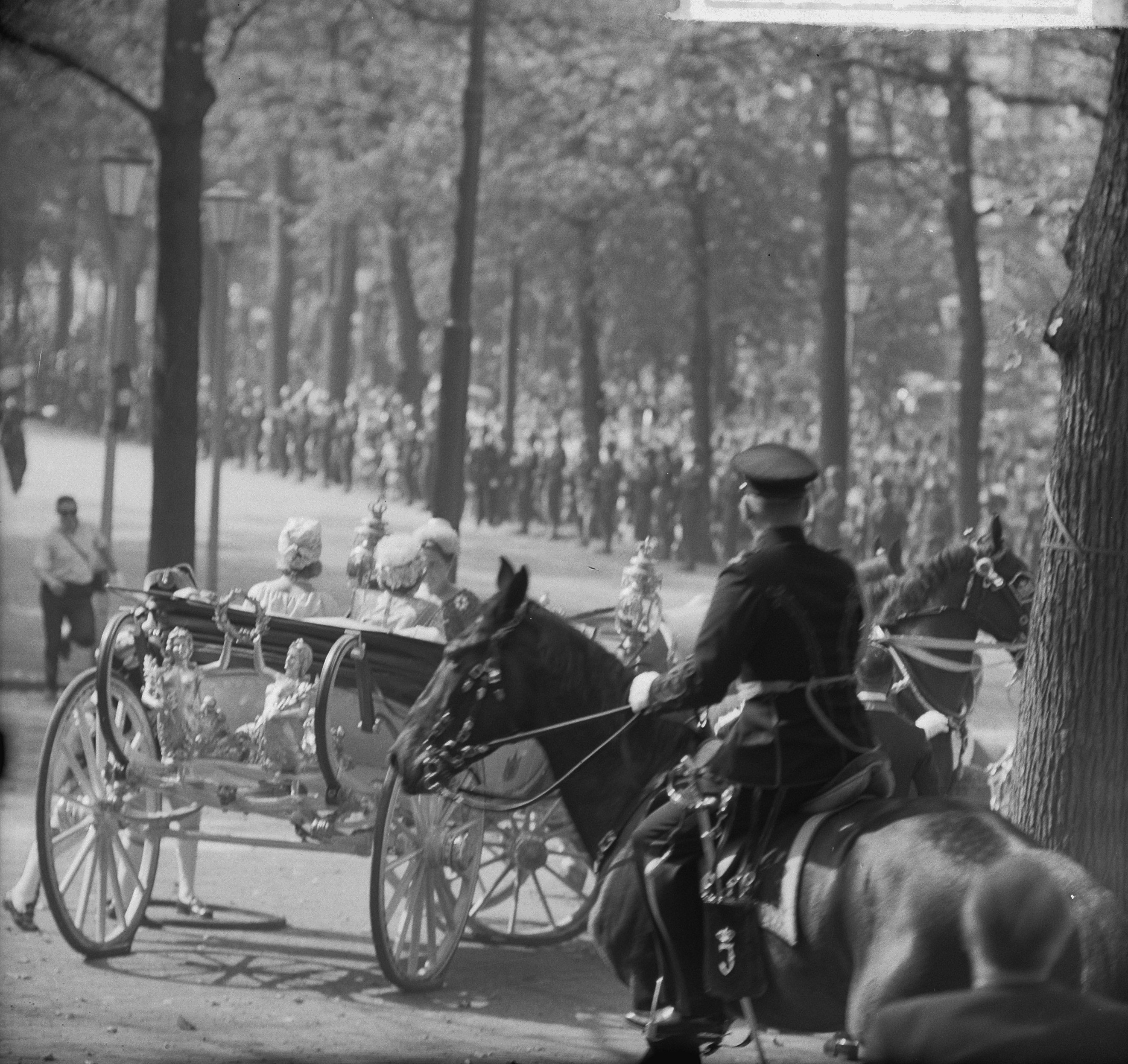 Collectie / Archief : Fotocollectie Anefo Reportage / Serie : [ onbekend ] Beschrijving : Opening Staten-Generaal in de Ridderzaal. In de caleche de 3 prinsessen, op de grond de band die van wiel was gelopen Datum : 17 september 1963 Locatie : Den Haag, Zuid-Holland Instellingsnaam : Ridderzaal Fotograaf : Nijs, Jac. de / Anefo Auteursrechthebbende : Nationaal Archief Materiaalsoort : Negatief (zwart/wit) Nummer archiefinventaris : bekijk toegang 2.24.01.03 Bestanddeelnummer : 915-5341